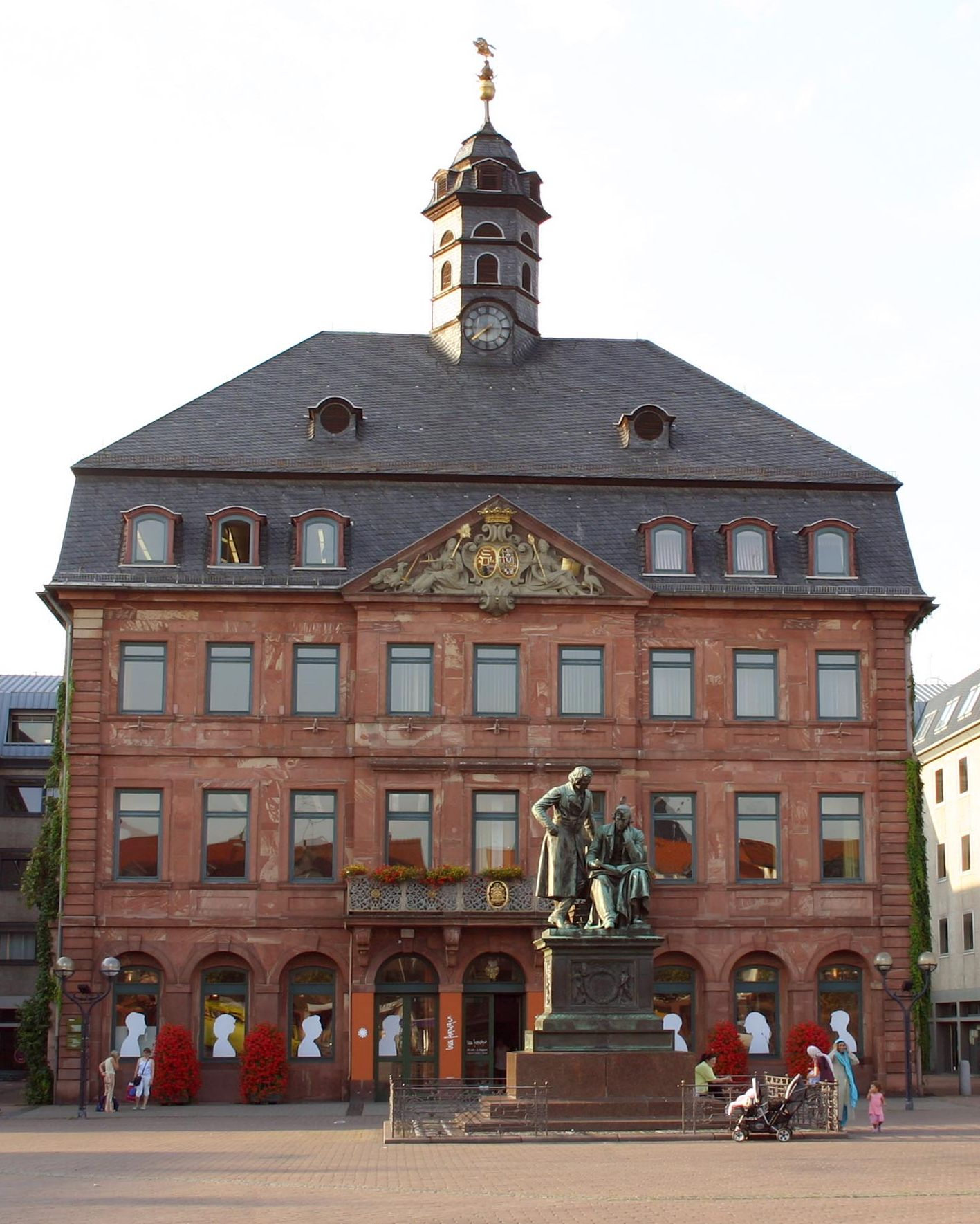 Neustädter Rathaus in Hanau, Deutschland